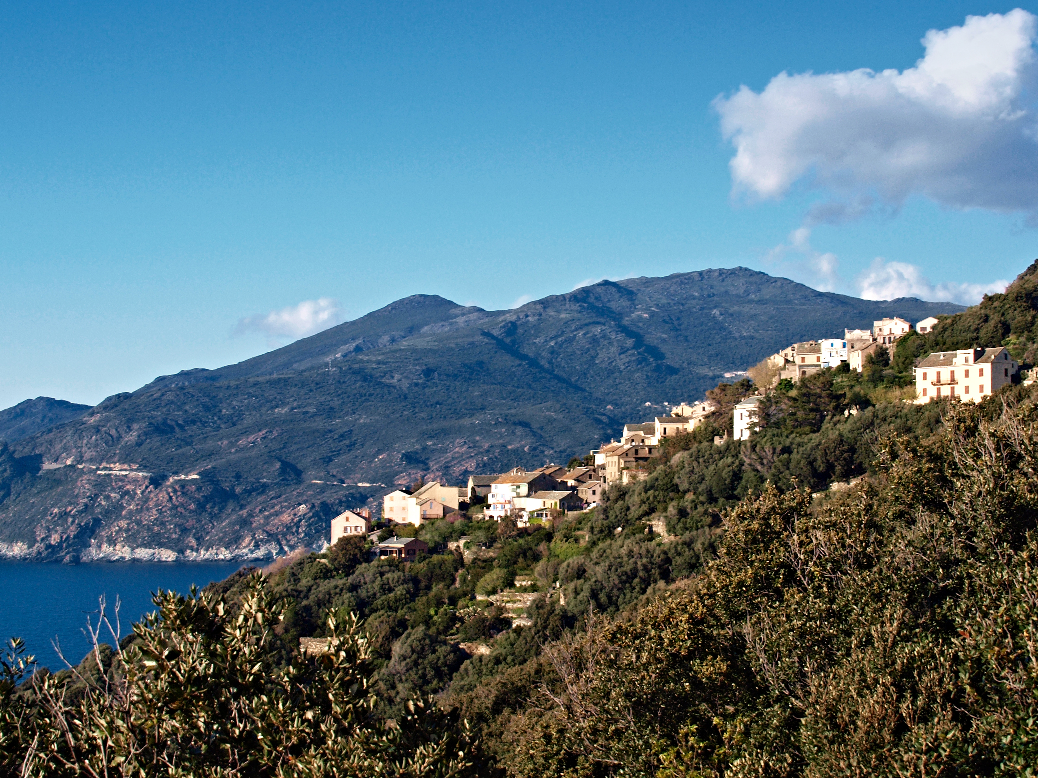 Canari (Corsica) - Marinca